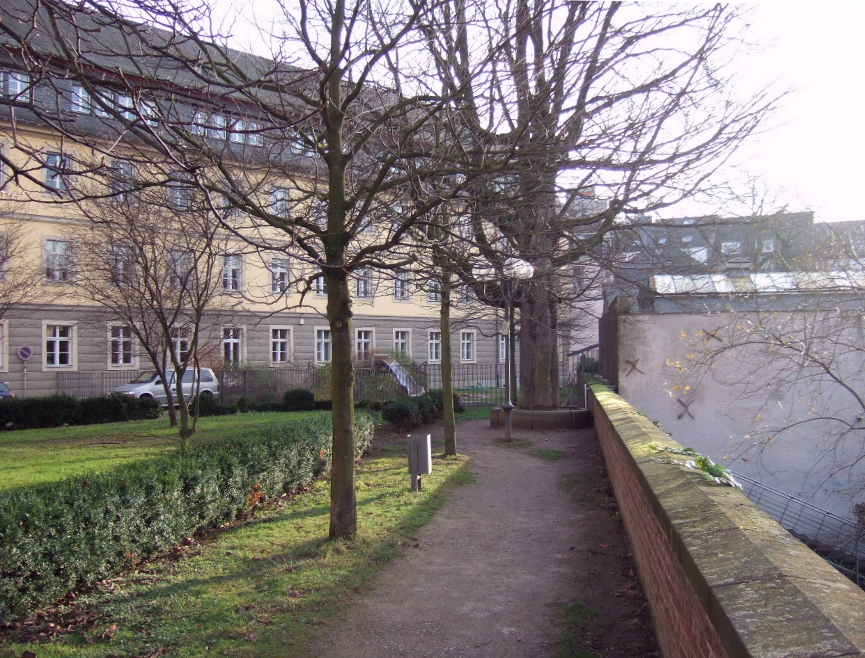 Altes Stadthaus in Bonn